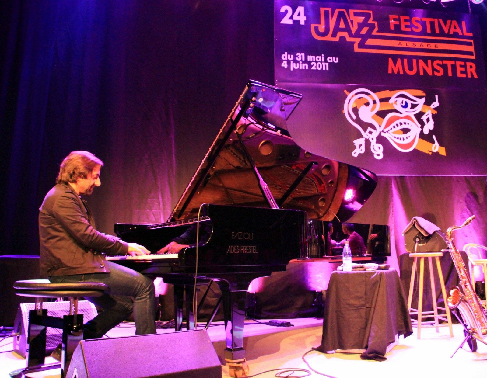 André Manoukian au Jazz Festival de Munster (Haut-Rhin, France).